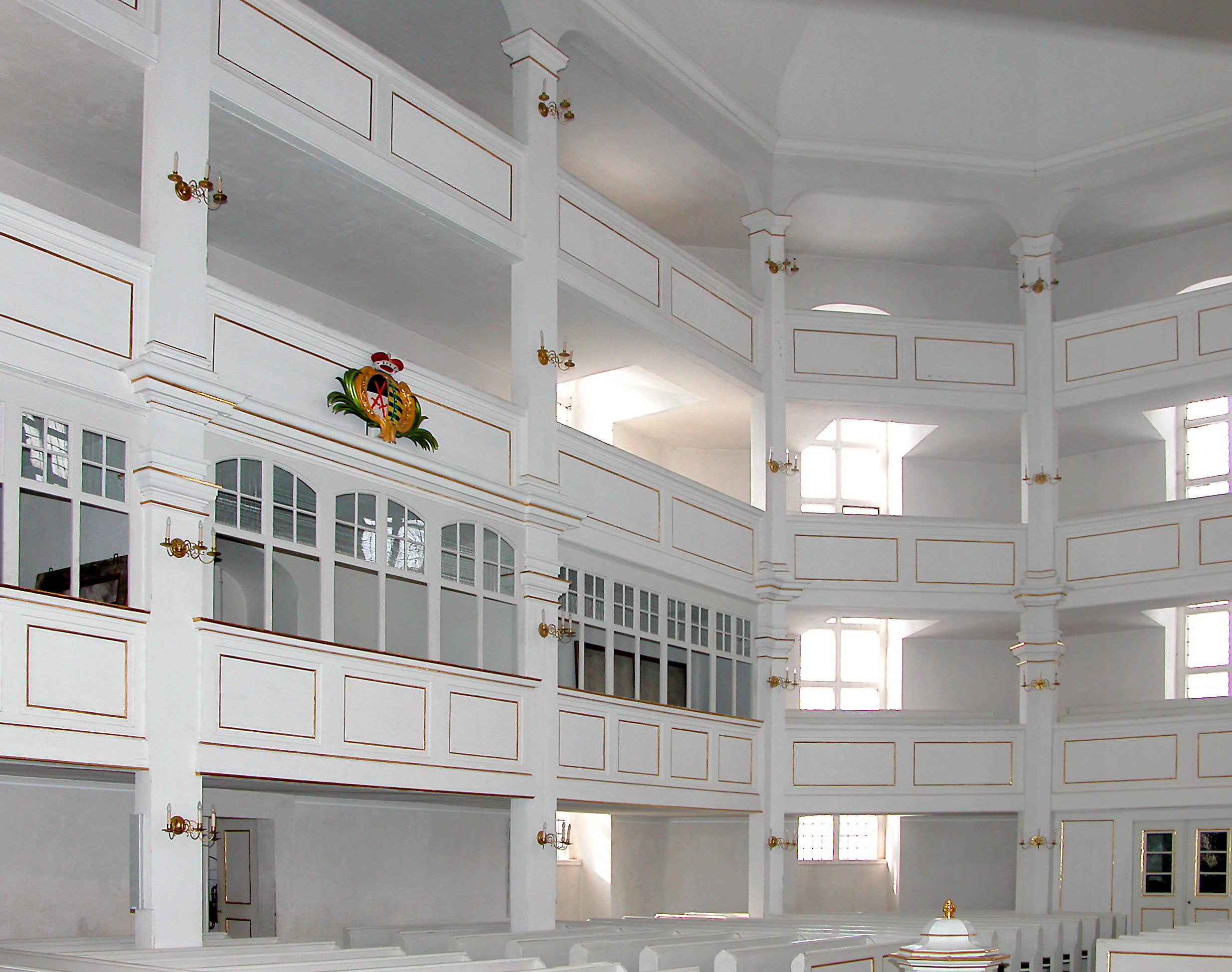 01.04.2001 01847 Lohmen, Dorfstraße (GMP: 50.989566,13.995545): Kirche, Barockbau von 1786-1789 von J. D. Kayser. [DSCN8808.TIF]20060305135DR.JPG(c)Blobelt